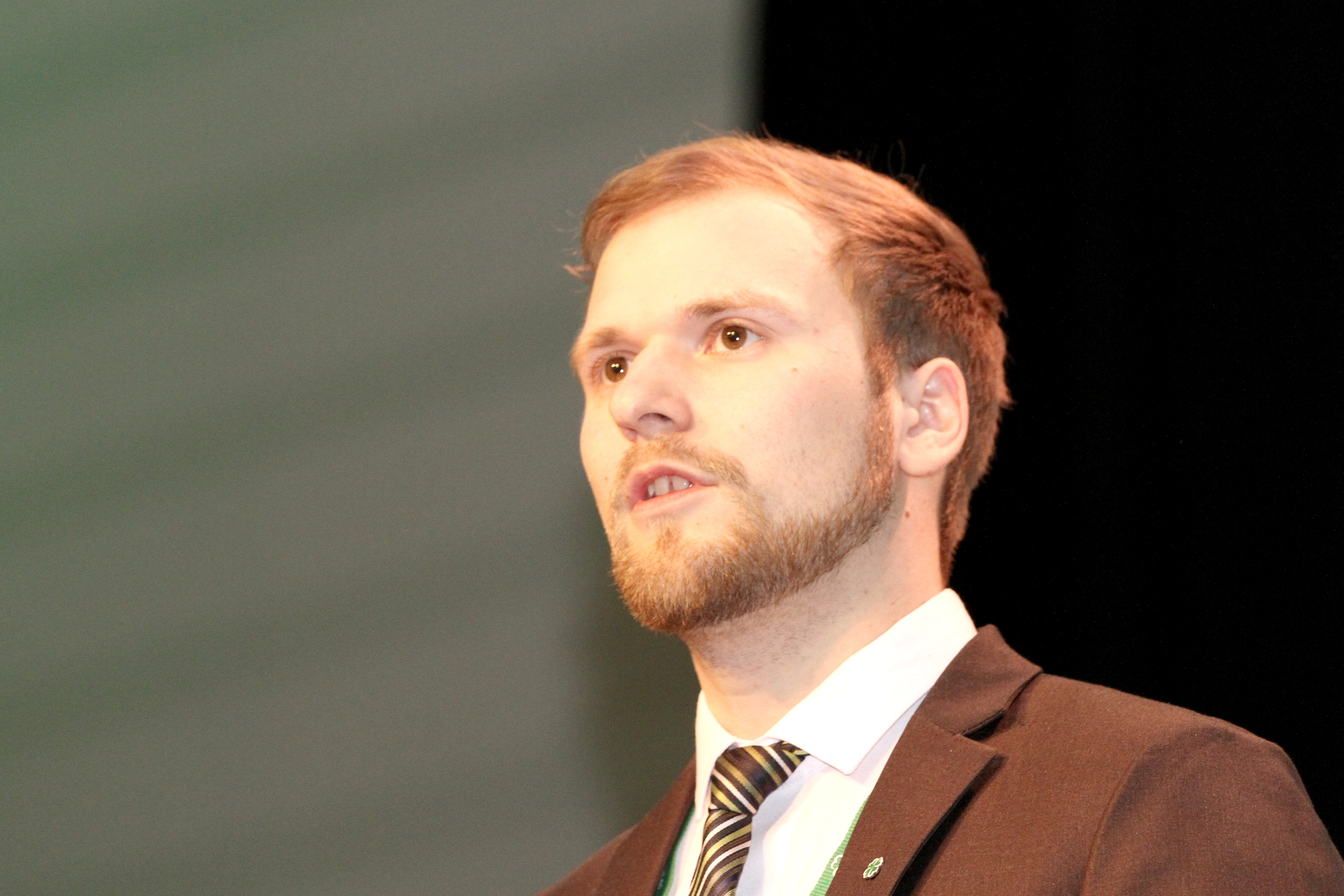 Willfred Nordlund underSenterpartiets landsmøte 2017.